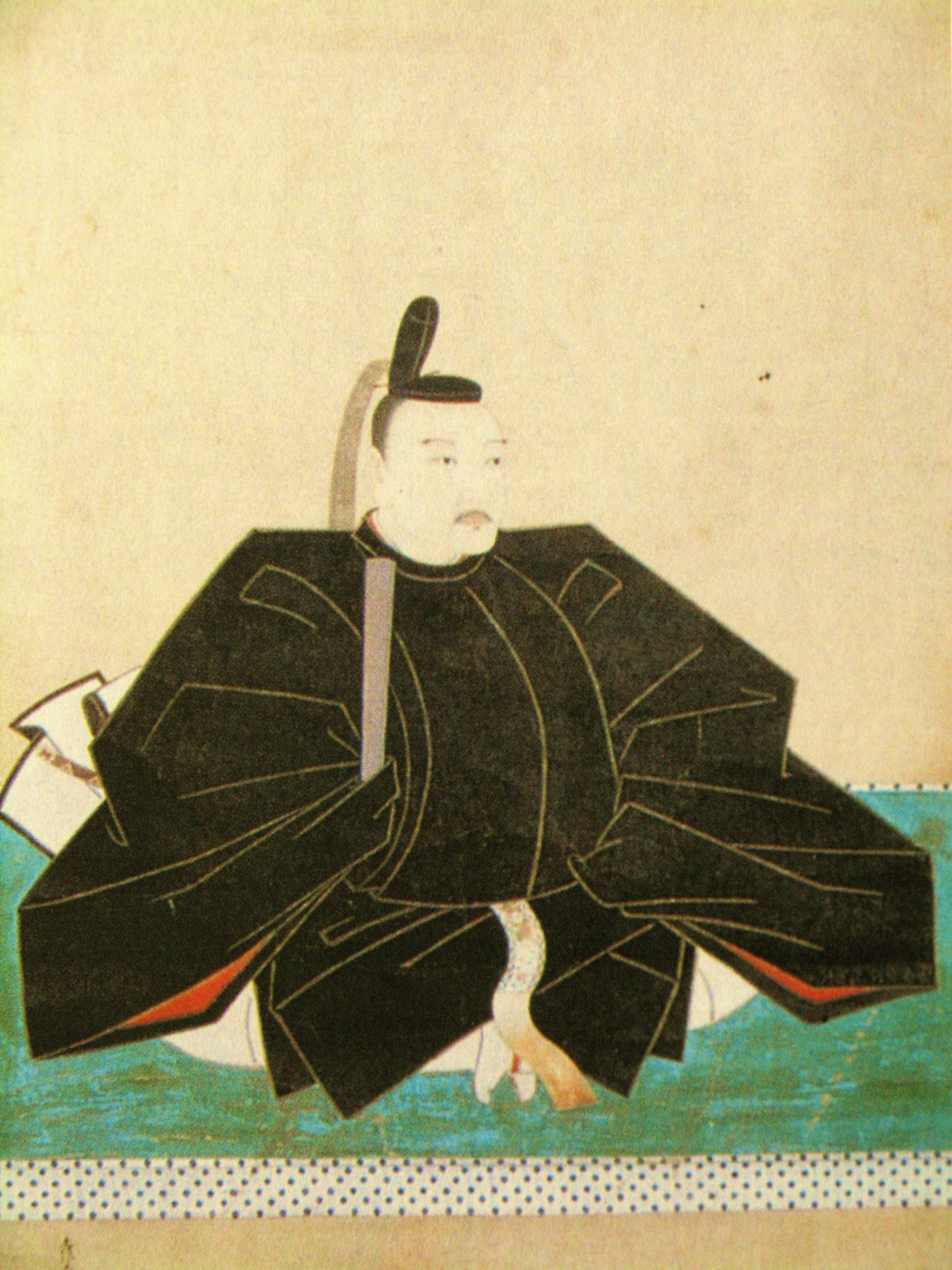 早雲寺所蔵の北条氏直像。